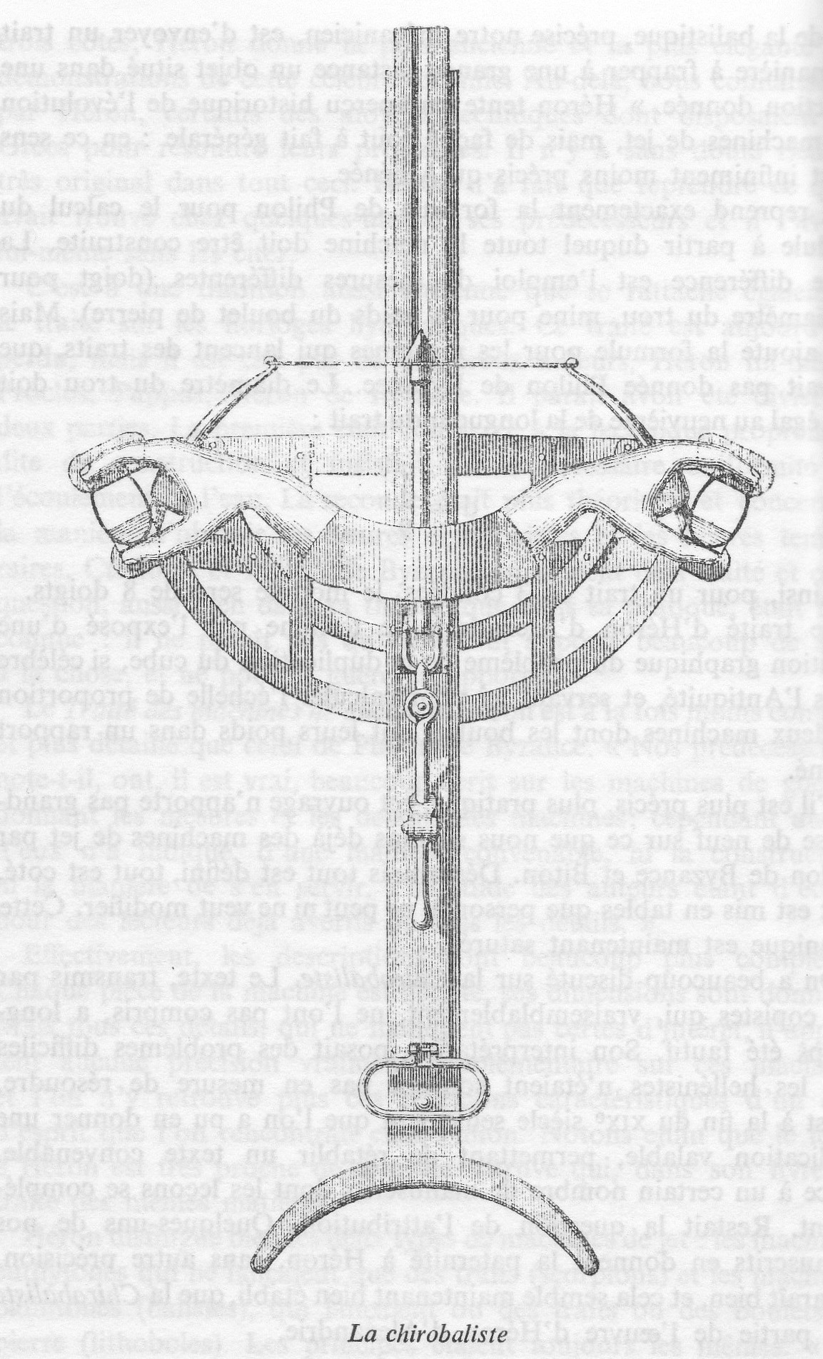 Machine de jet de type palintone